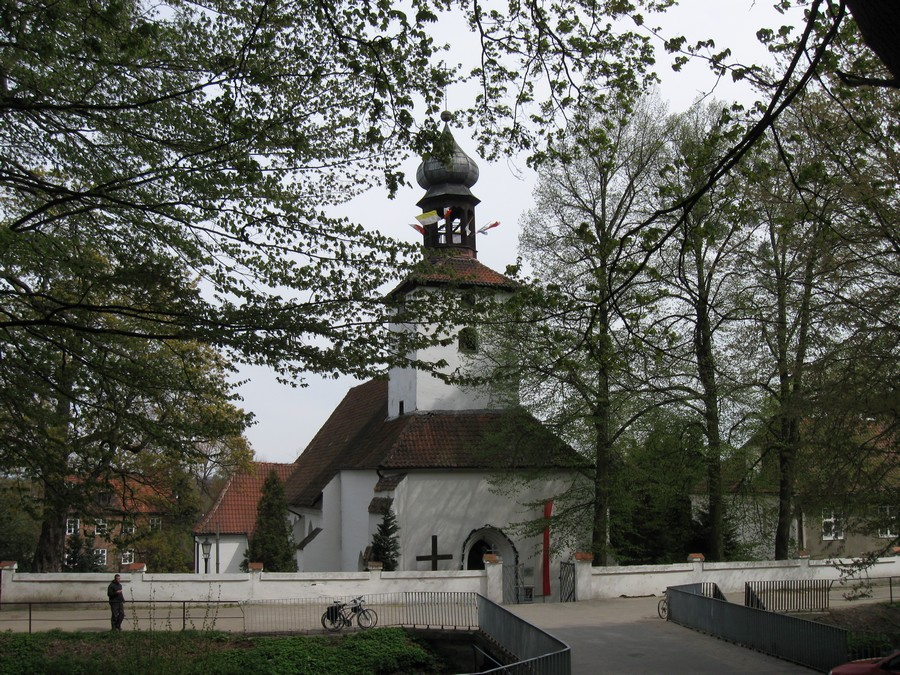 Gdańsk Święty Wojciech, Trakt Św. Wojciecha 440 – rzymskokatolicki kościół parafialny p.w. św. Wojciecha, 2 poł. XIV, 1575, 2 p. XVII